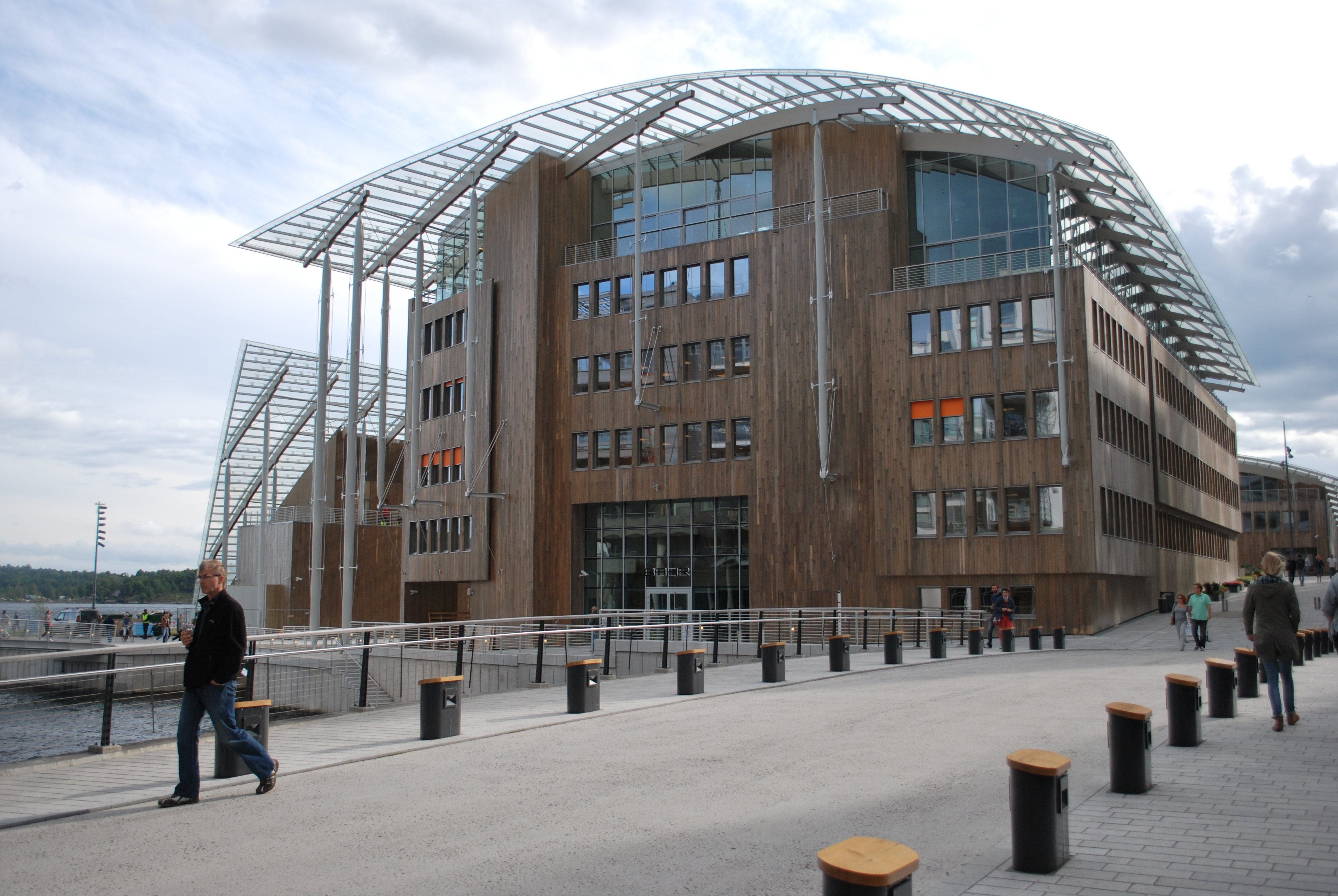 Bygningen til advokatfirmaet Bahr sett fra broen fra Odden til Holmen, Tjuvholmen, Oslo